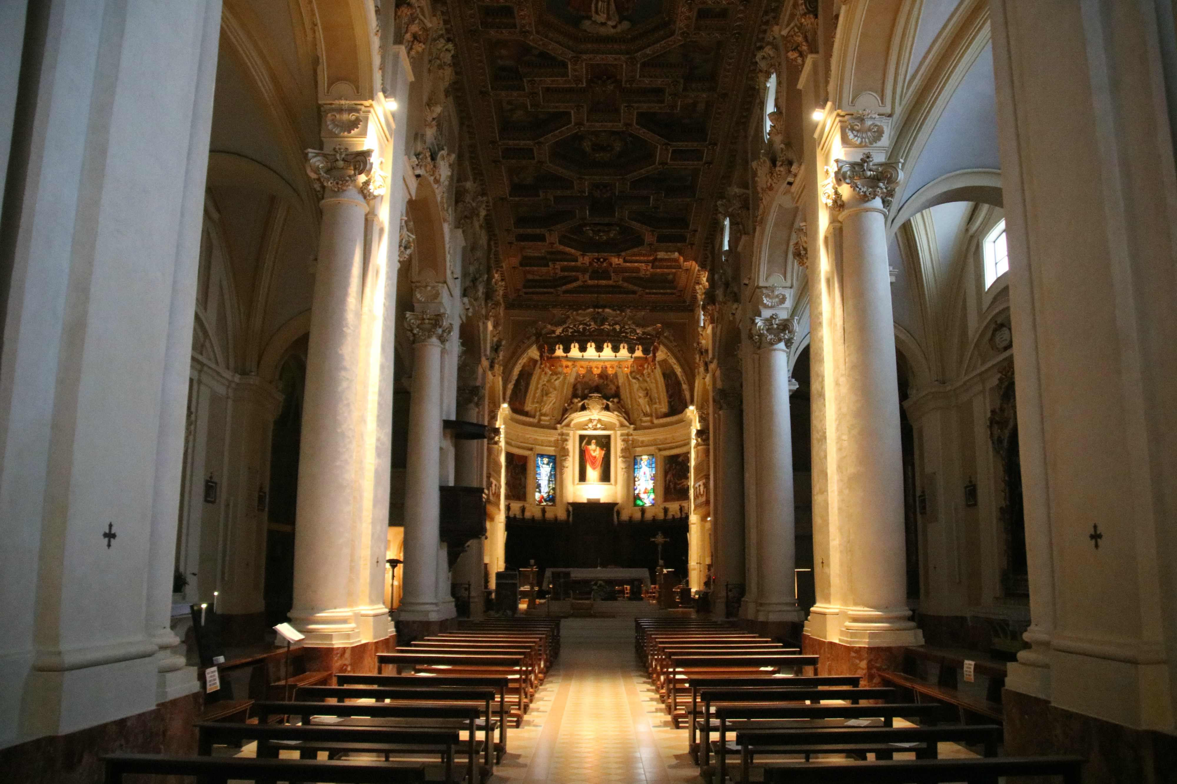 Concattedrale di San Flaviano (Recanati)